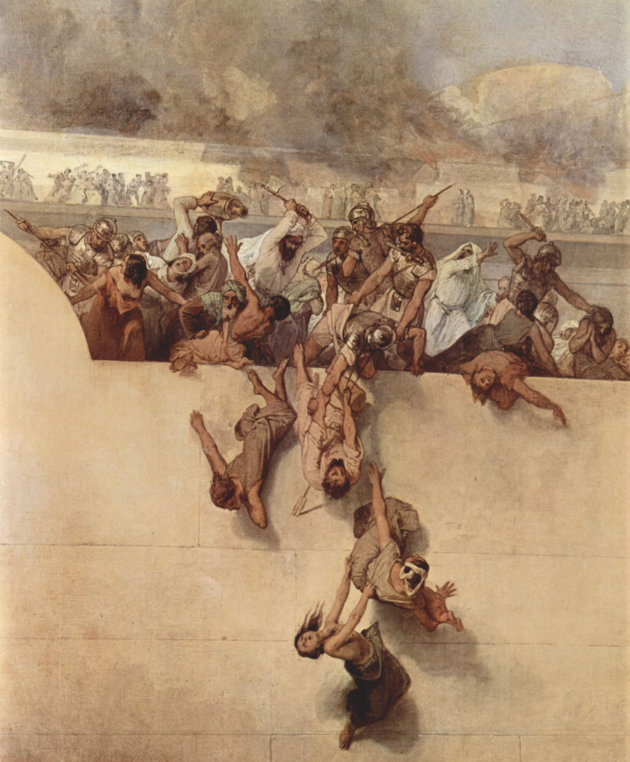 detail